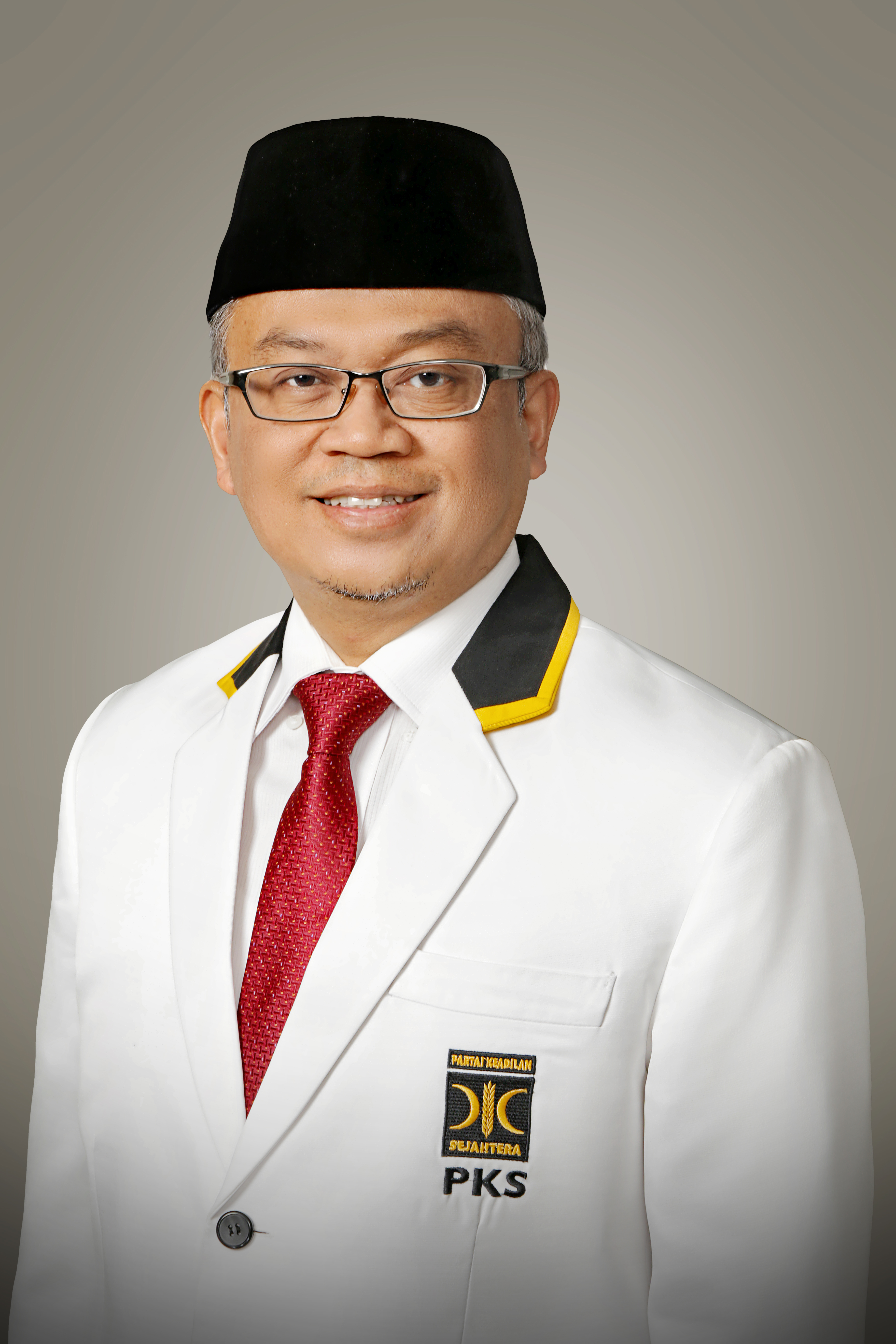 Aleg DPRD F-PKS Jawa Barat